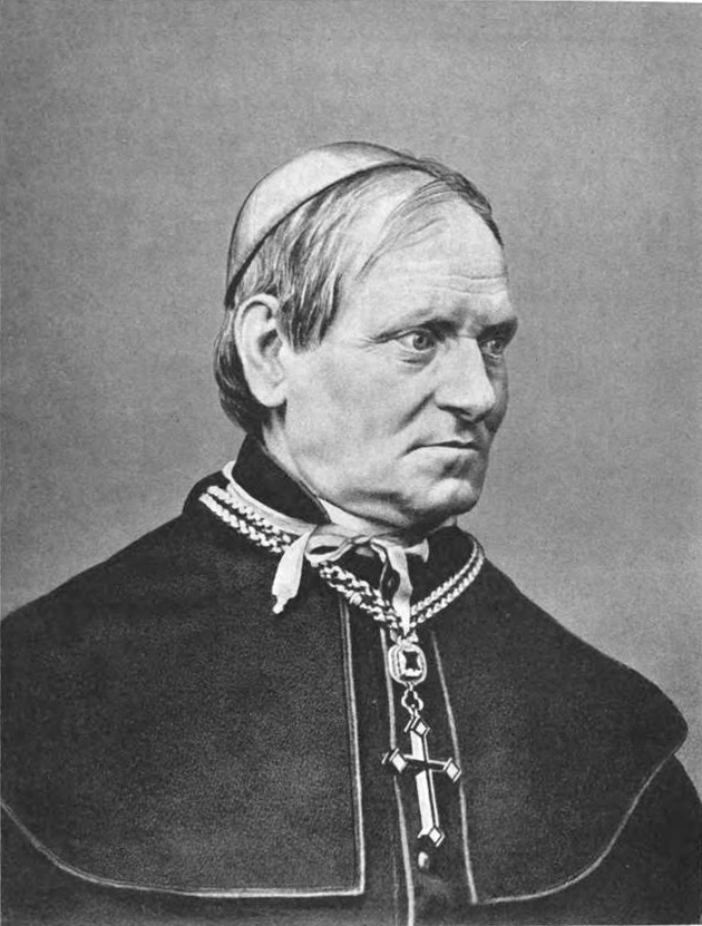 Conrad Martin, Bischof von Paderborn